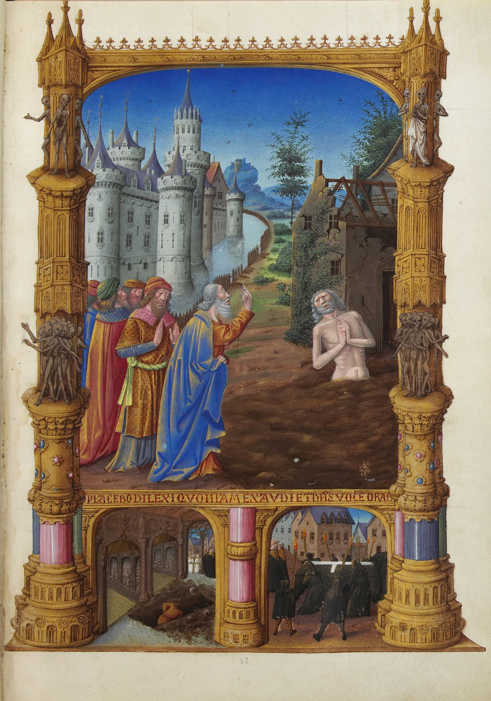 Les Très Riches Heures du duc de Berry, Folio 82r - Job Mocked by His Friends the Musée Condé, Chantilly. Job, sa feme et ses amis.